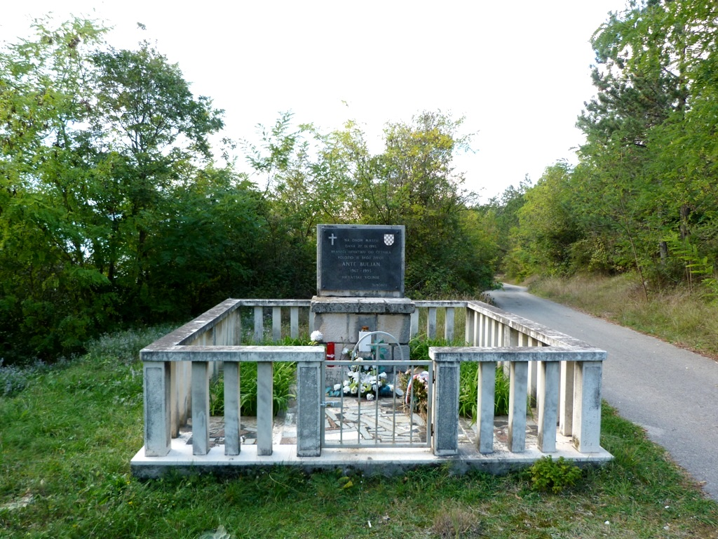 Spomenik HV poginulom vojniku Anti Buljanu u blizini brane Peruća